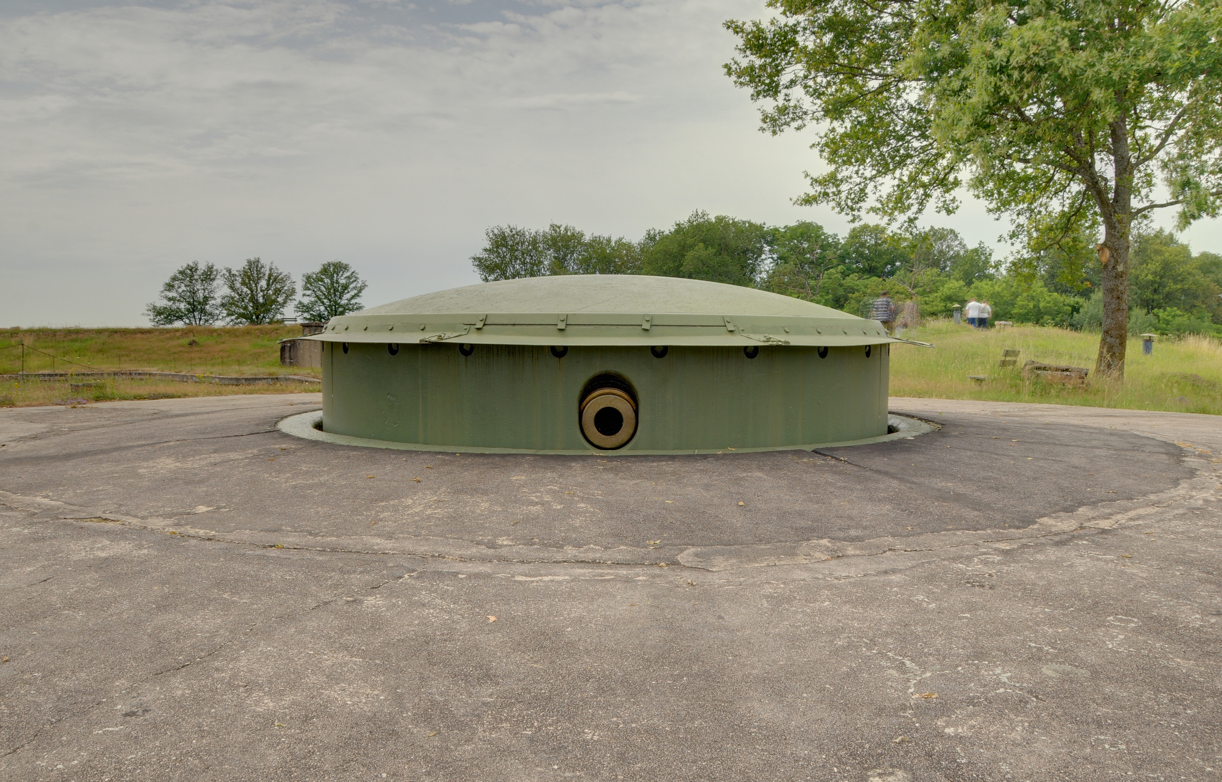 Tourelle de 155R vue de l'extérieur (HDR).